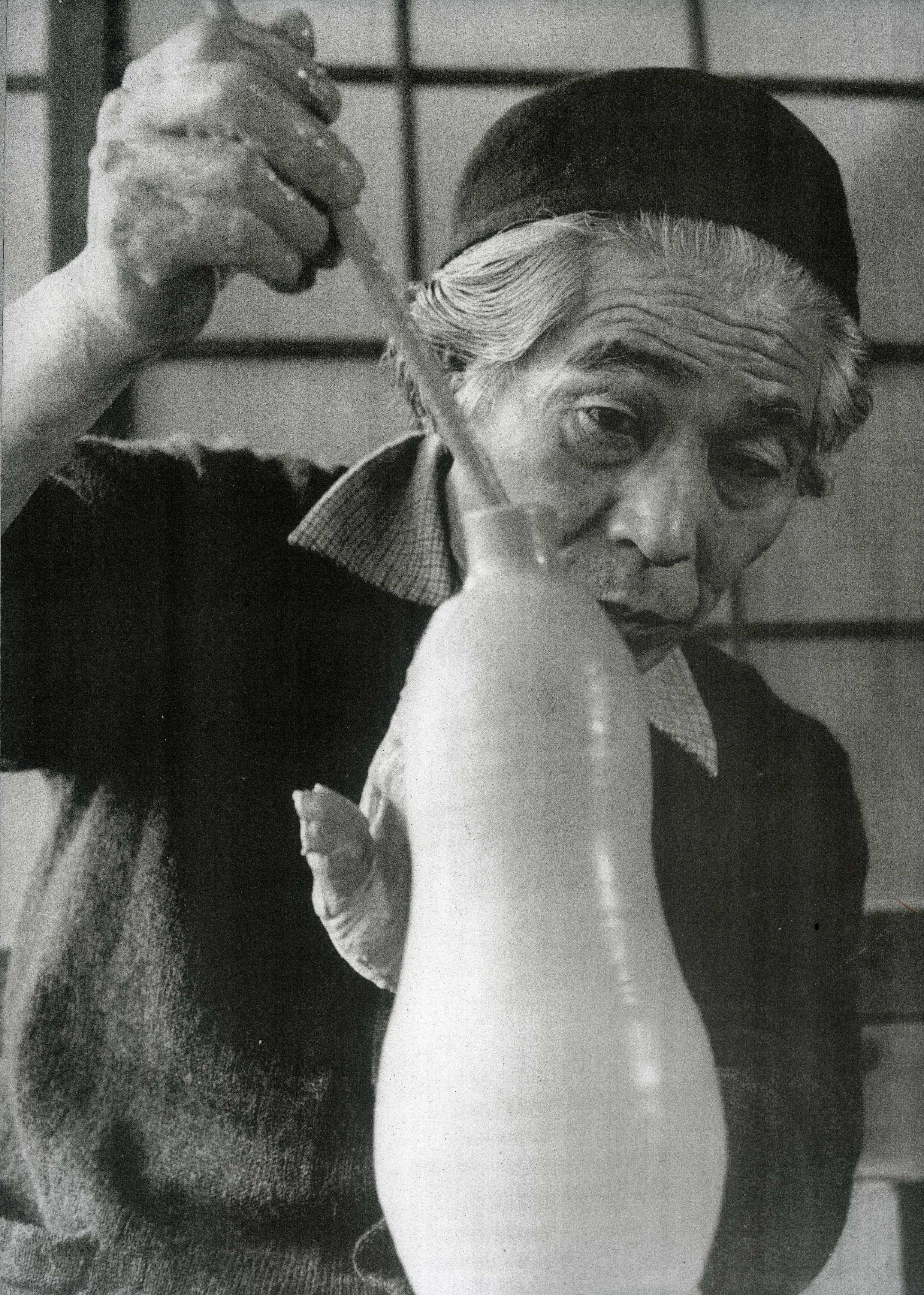 初代山岡徹山 山岡懋